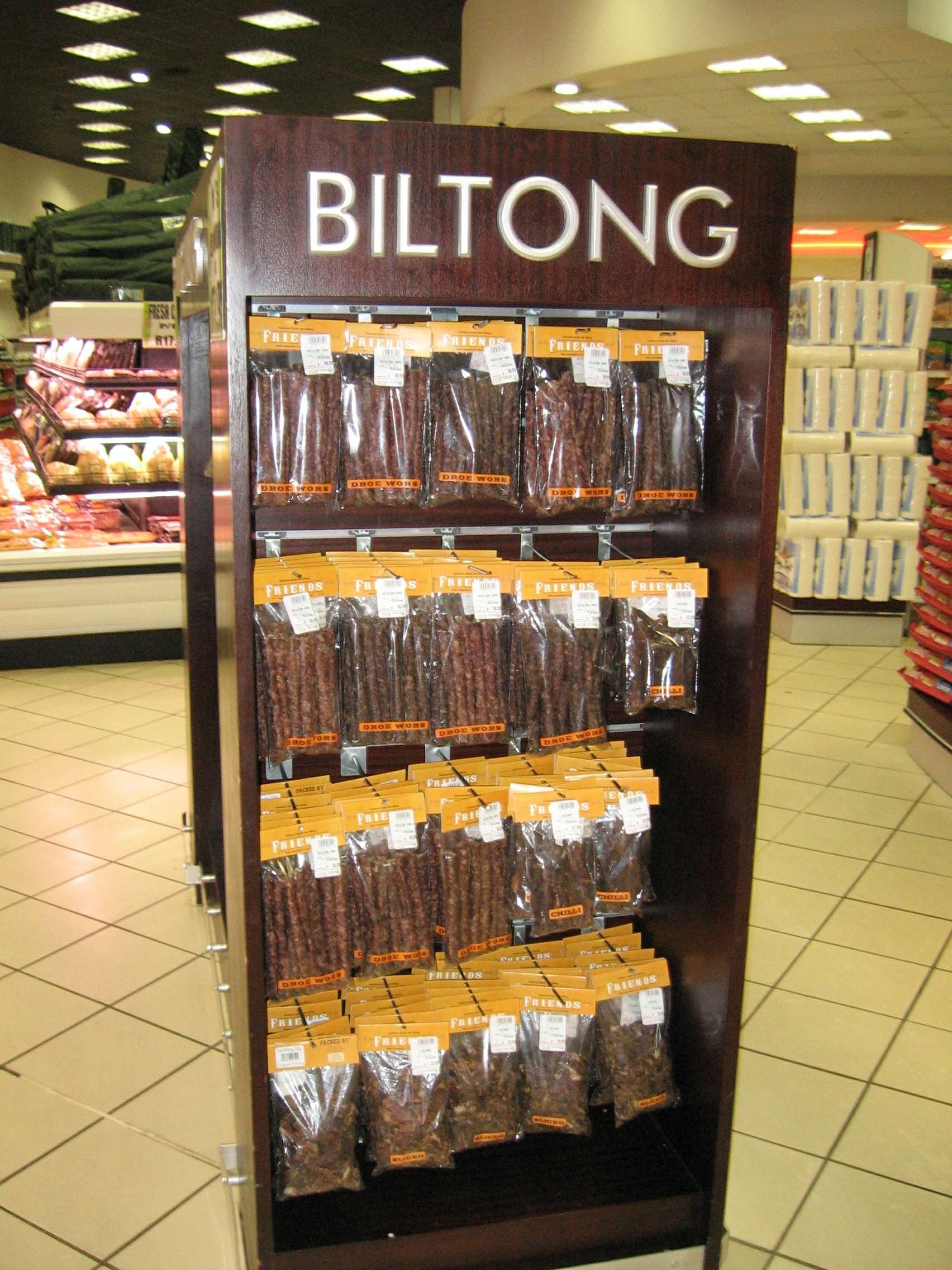 Biltong for sale in a Despar supermarket, Johannesburg